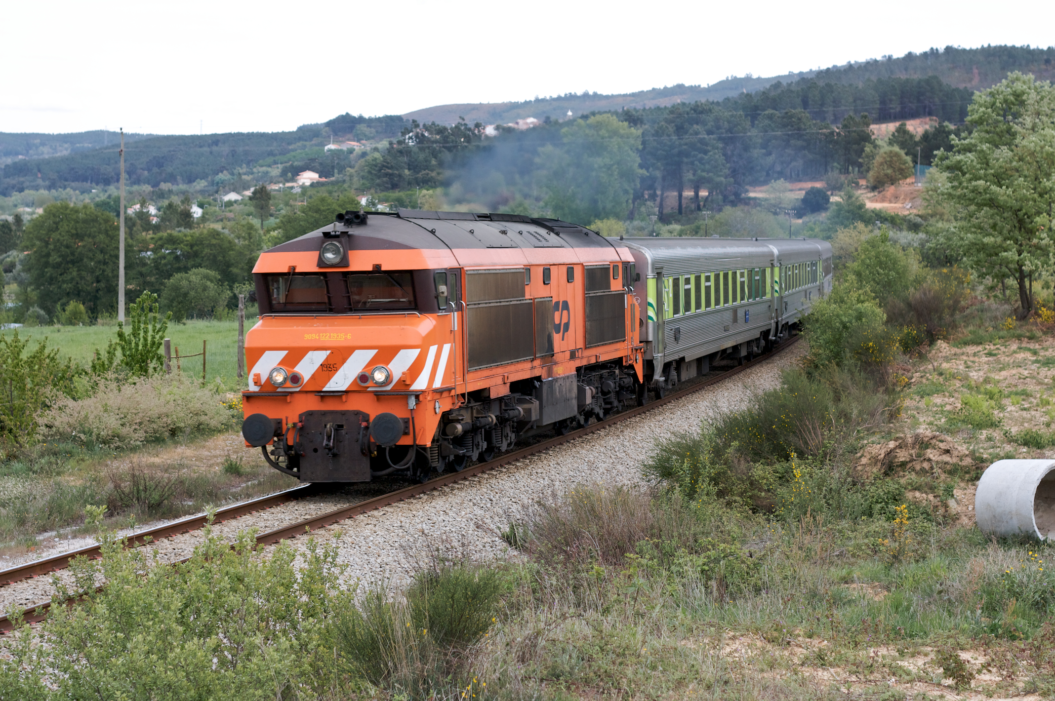 Tipo: Comboio Intercidades 543 [Lisboa • Santa Apolónia - Covilhã] Local: Donas [Linha da Beira Baixa, PK 144] Data e hora: 9 de Abril de 2009 [16h57] Material: Locomotiva 1935 Barreiro + 4 carruagens Sorefame Renovadas